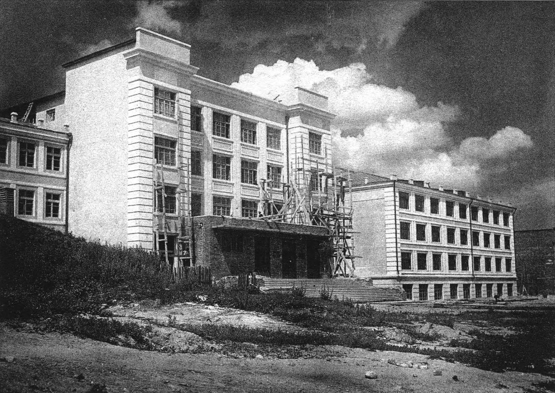 Беларуская (тарашкевіца): Менск (Miensk), тракт Барысаўскі (trakt Baryŭski). Палітэхнічны інстытут